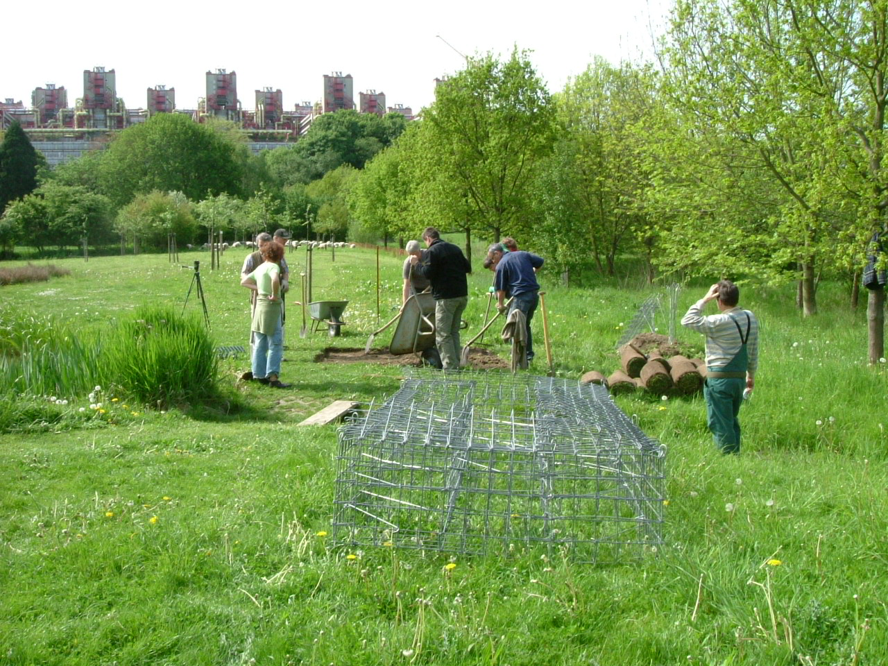 Bau eines Grassofas der Bürgerstiftung Lebensraum Aachen am Aktionstag 9.5.2009